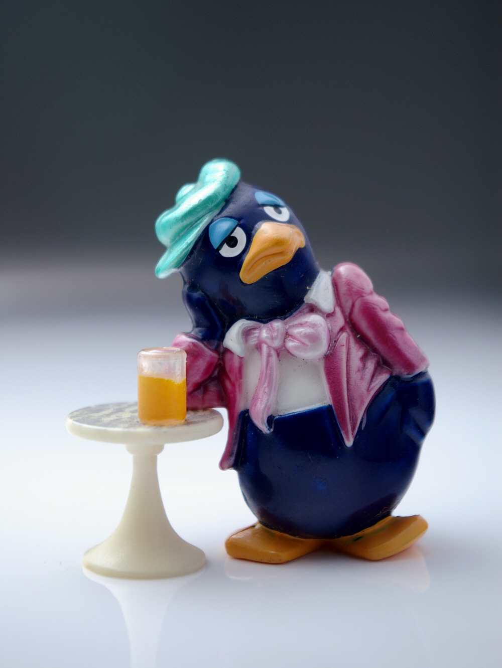 Weiche Ausleuchtung einer Nahaufnahme mittels Lichtzelt